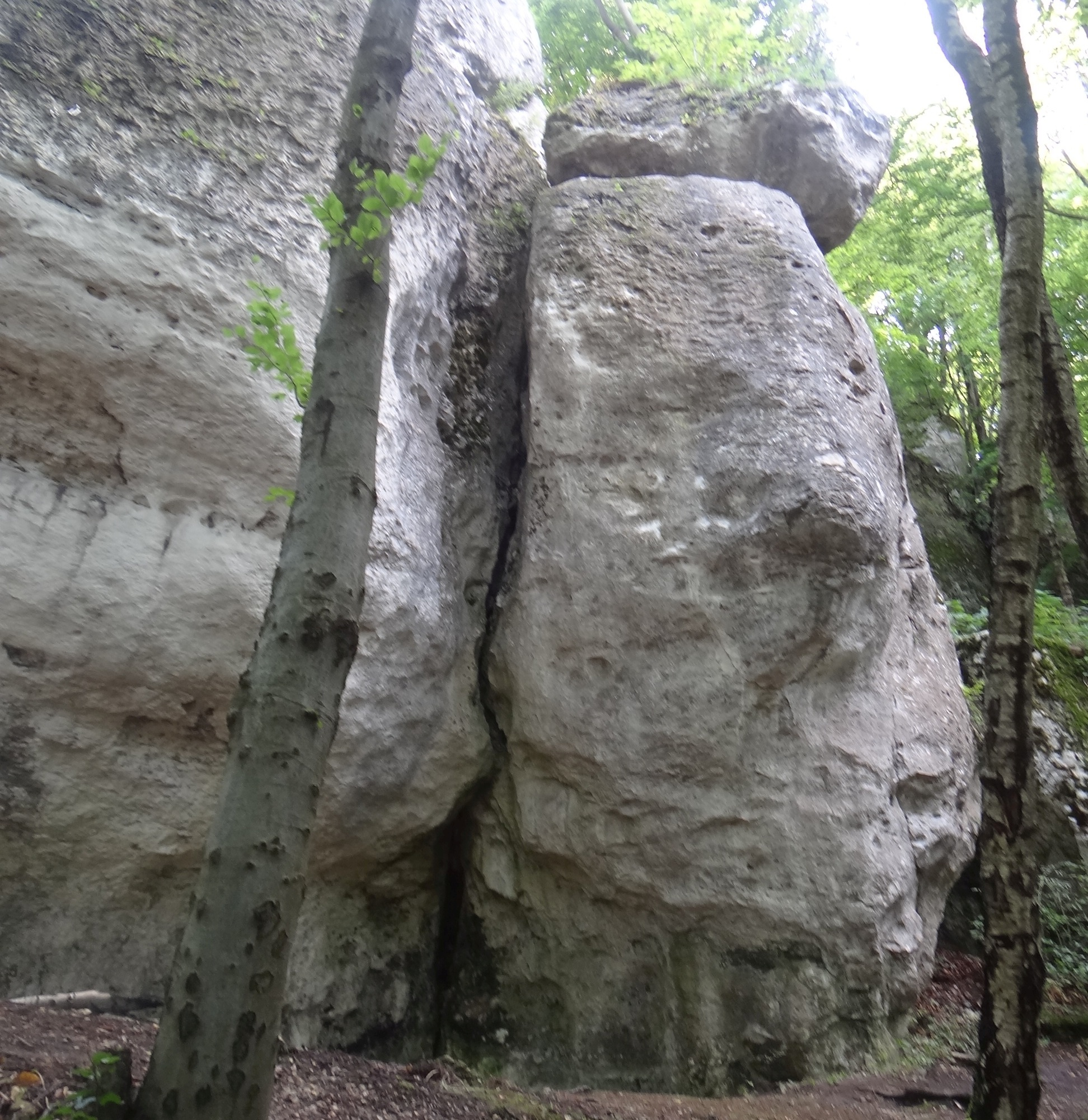 Wysoki Okap i Turnia z Dziurą (po prawej stronie) w grupie skał Jastrzębika na Wyżynie Częstochowskiej